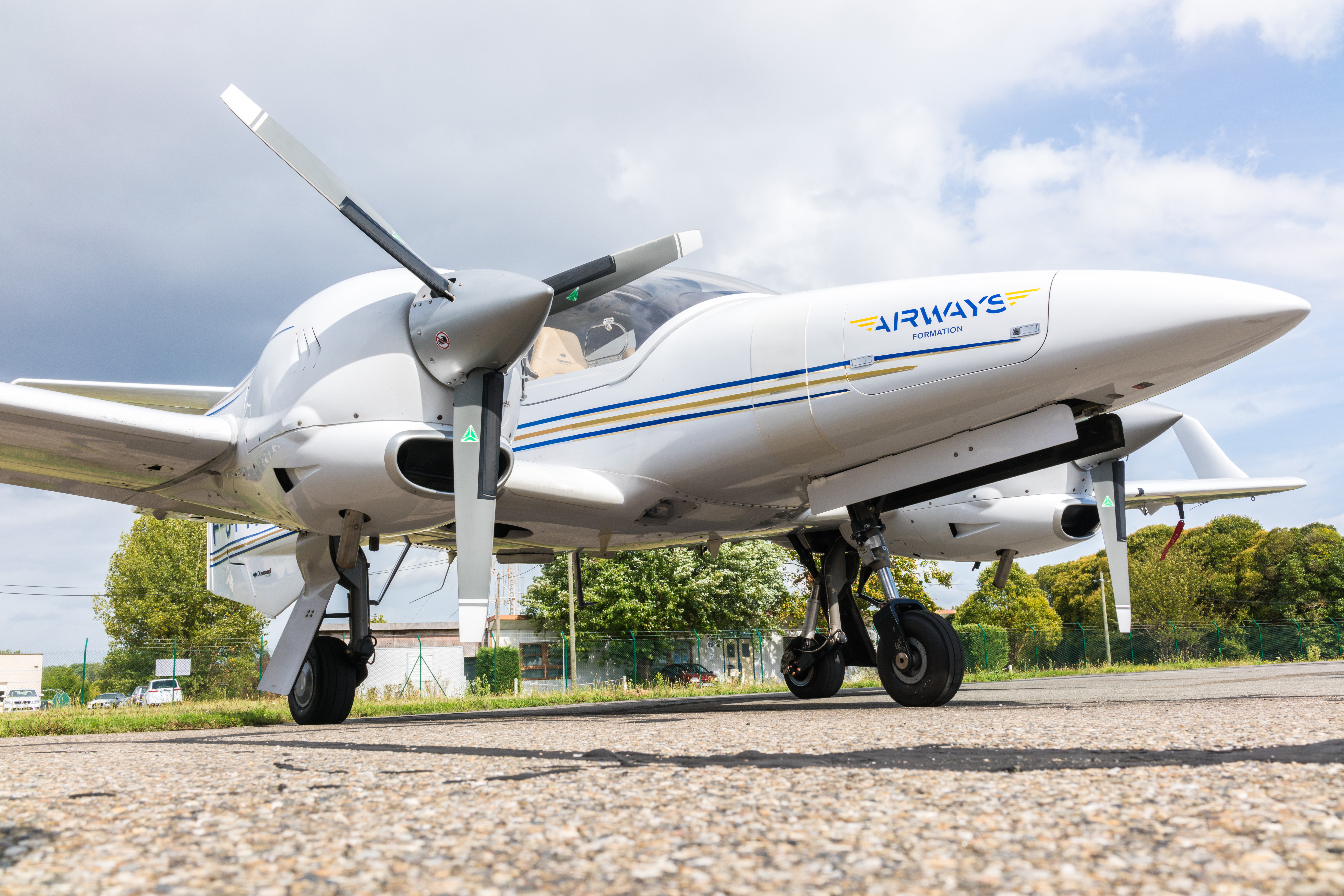 DA42 contre plongée